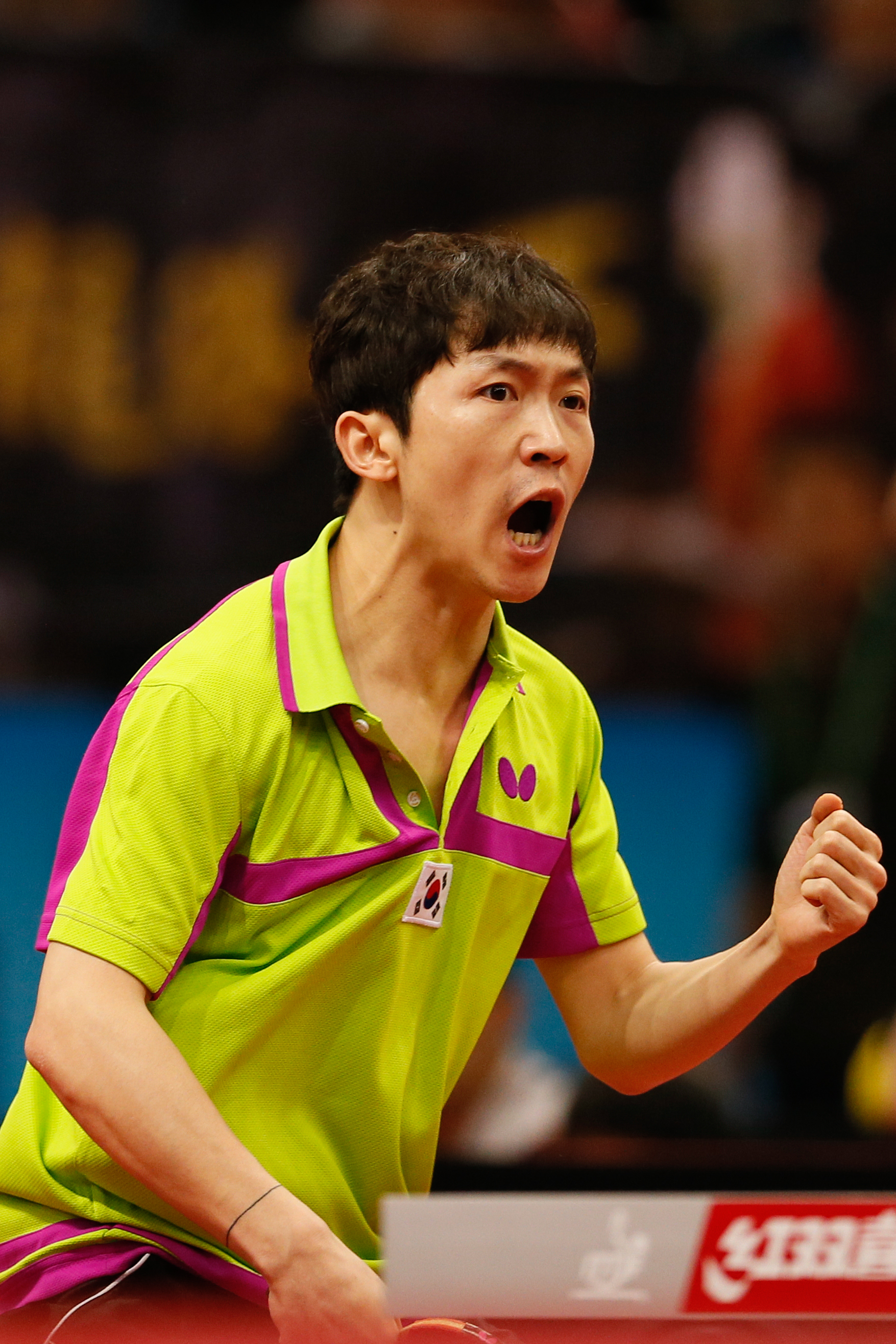 _K0K2429